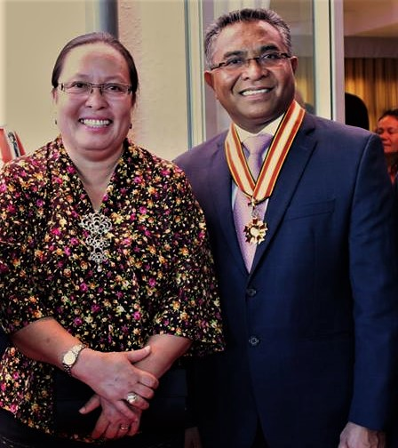 Rui Maria de Araújo und seine Ehefrau Teresa António Madeira Soares